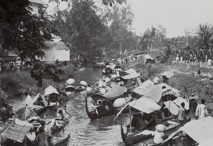 foto. Prauwen in een smalle kreek in de omgeving van de sociëteit, Bandjermasin